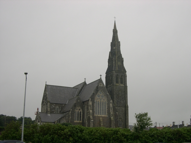 Tramore (Írország), gótikus templom